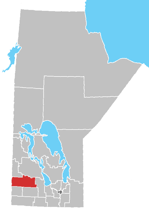 Manitoba census area No. 15